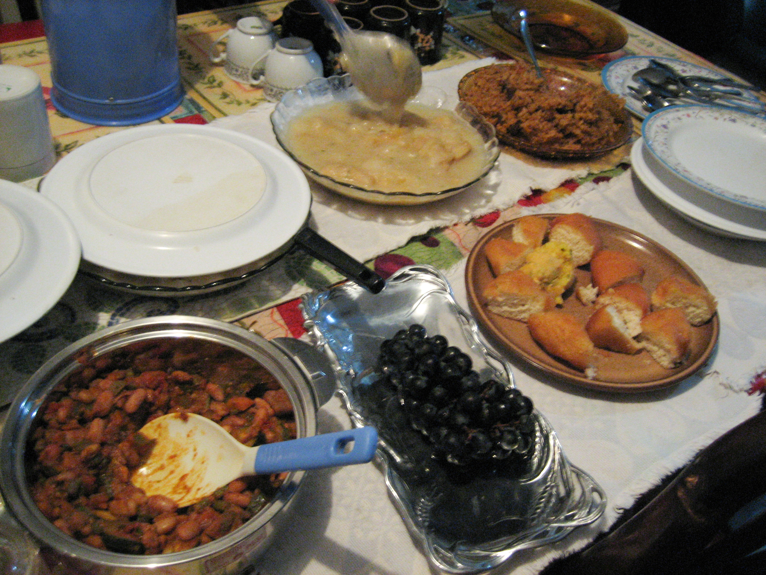 Ramadan dinner in Tanzania